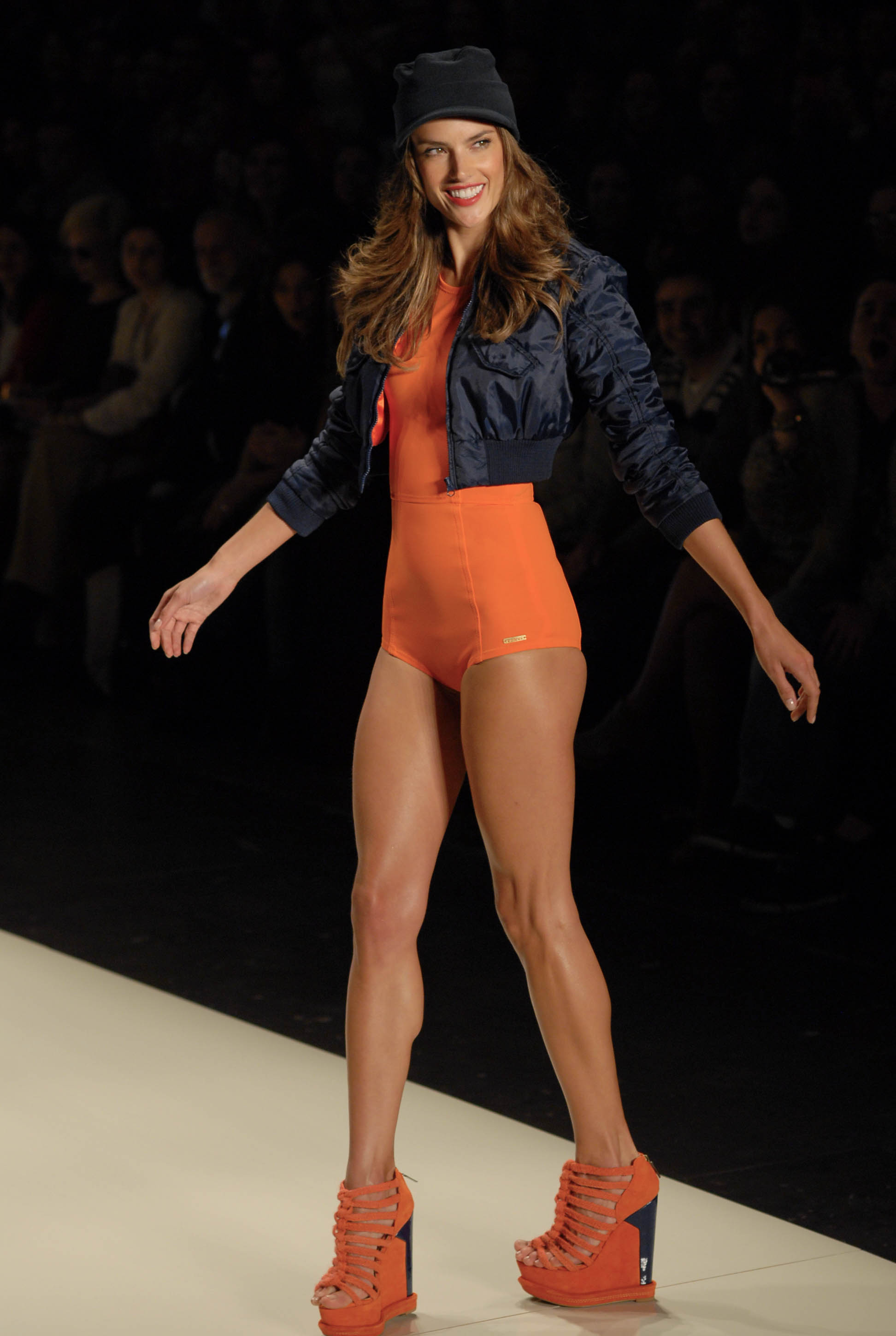 Foto: Marcos Madi